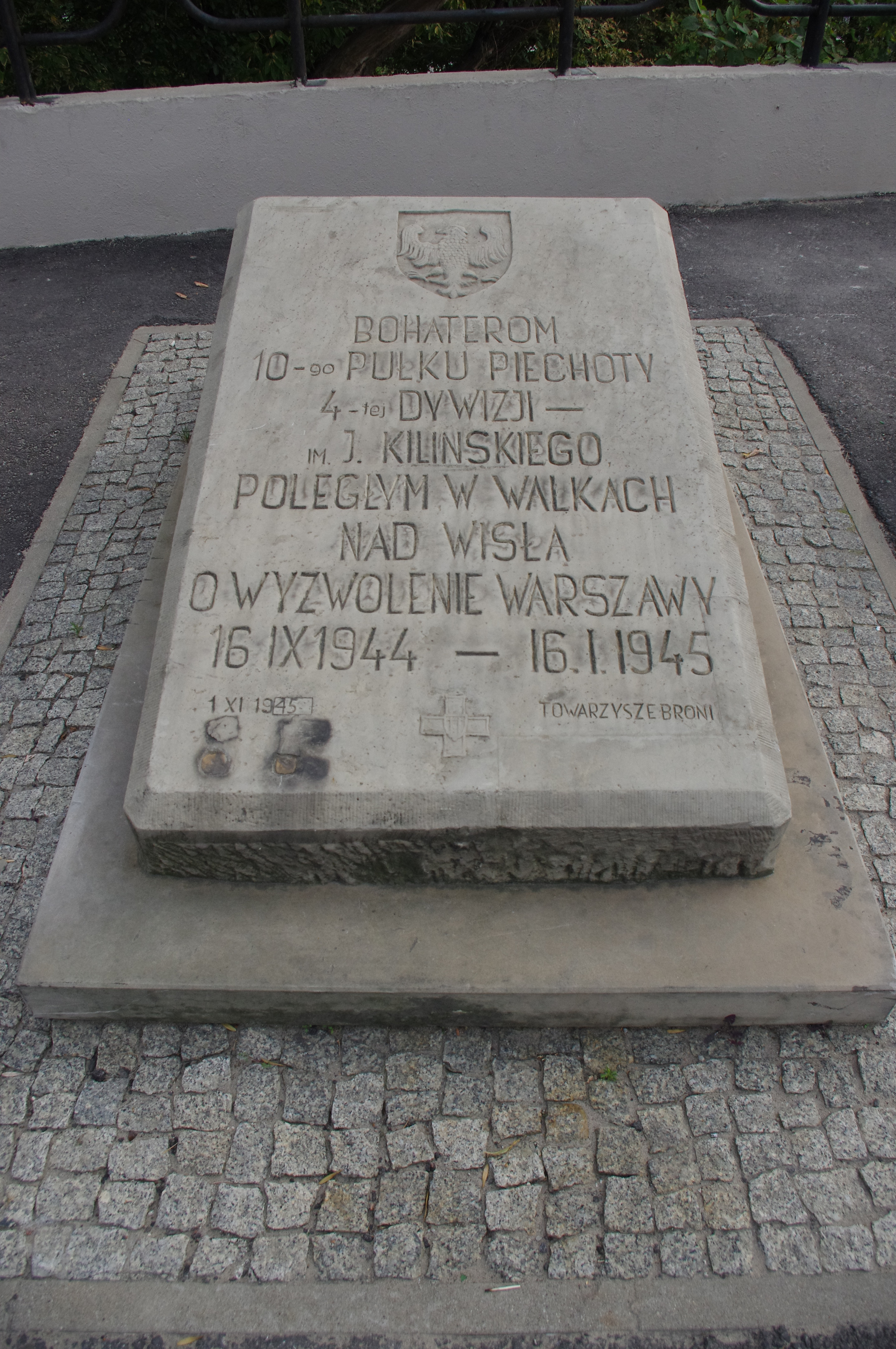 Kamień upamiętniający 4 Pomorską Dywizję Piechoty im. Jana Kilińskiego znajdujący się u wylotu Mostu Poniatowskiego w Warszawie (strona praska). Wykonany z ruin kościoła św . Aleksandra w Warszawie.